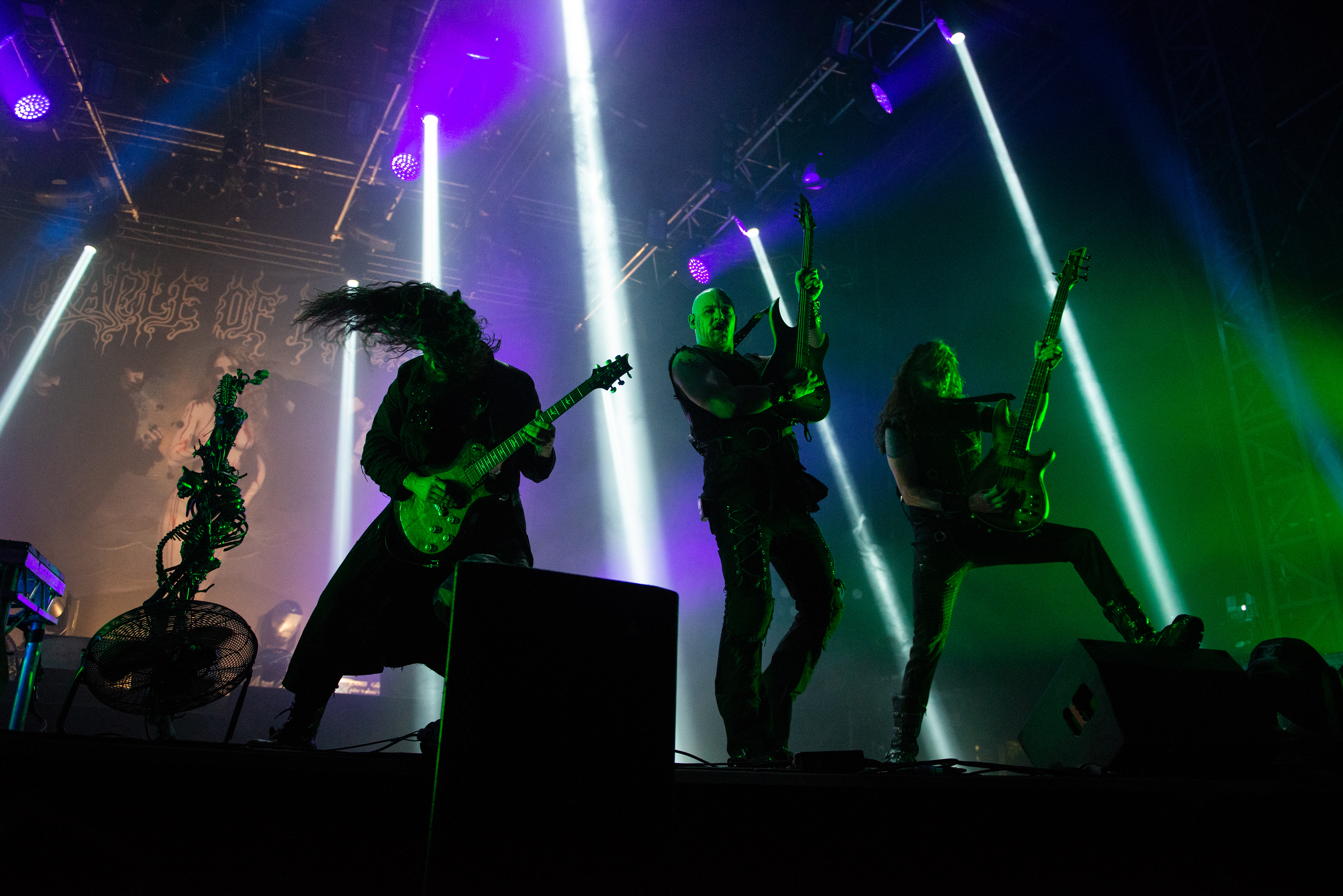 Concert du groupe britannique Cradle of Filth au Hellfest 2019.